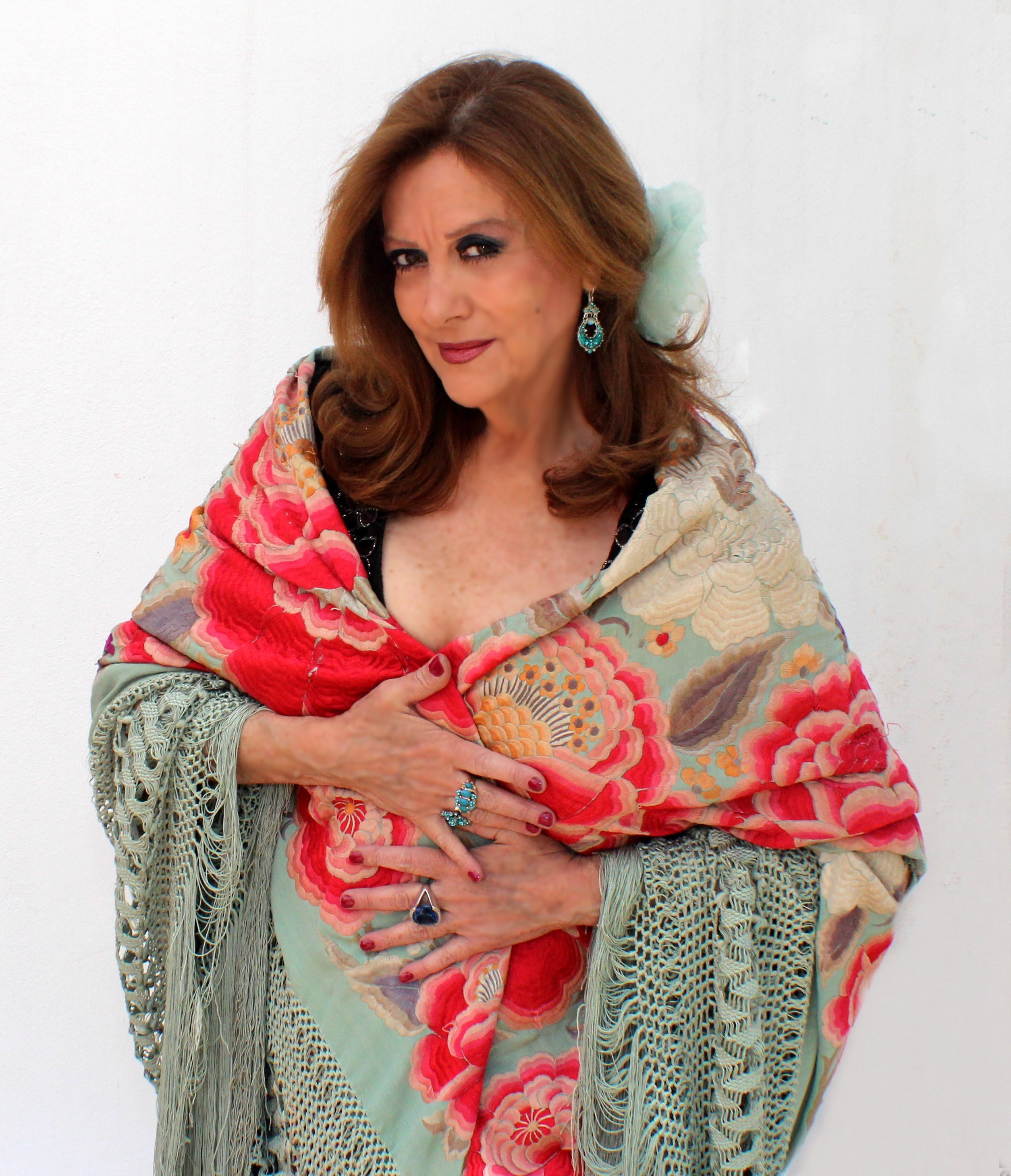 Olga María Ramos con mantón centenario